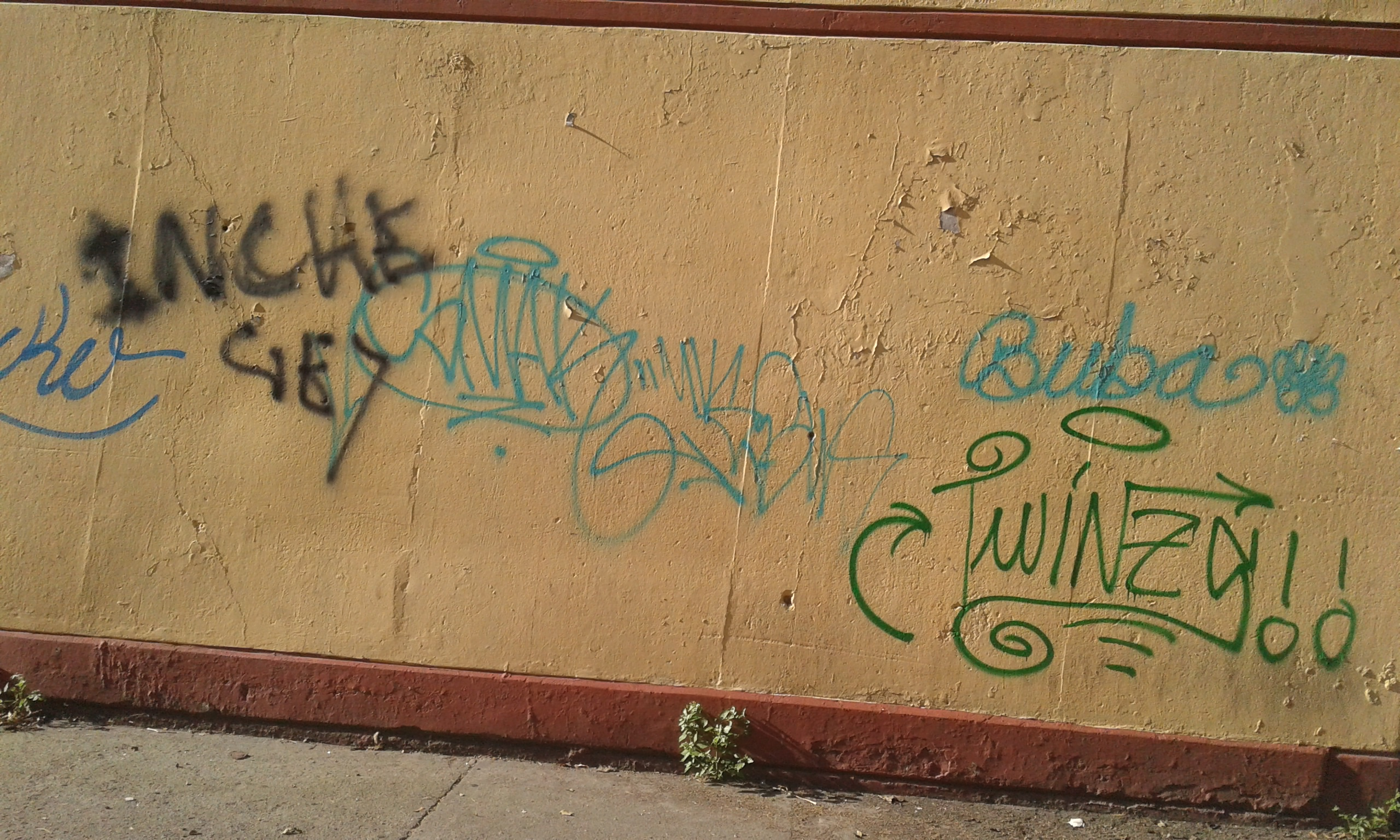 No Disponible